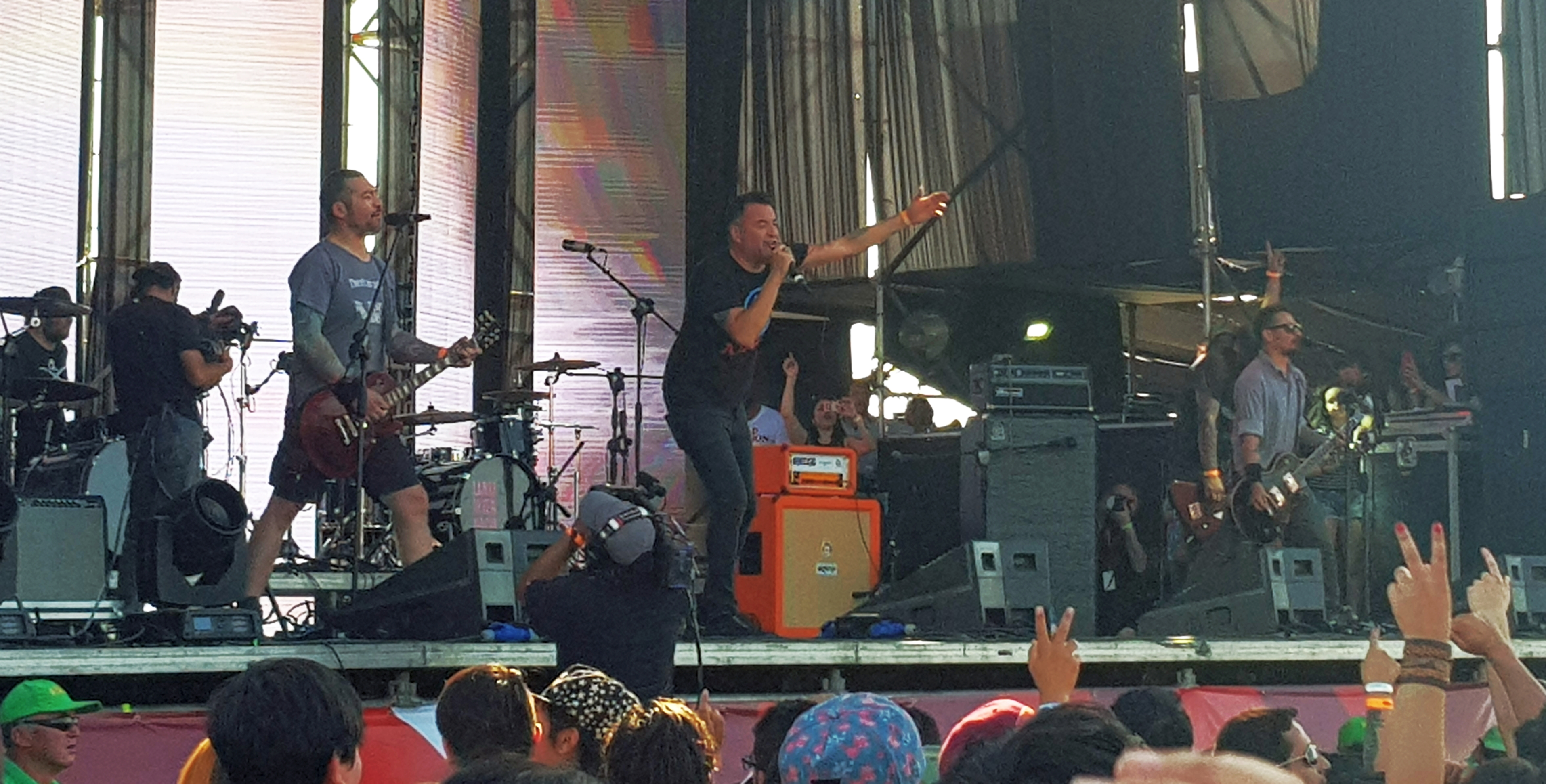 Fiskales Ad Hok en la cumbre del Rock Chileno 2018, 27/01/2018